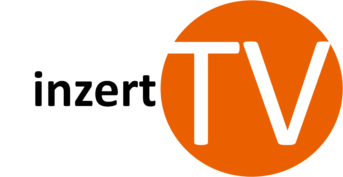 Logo již neexistující Inzert TV